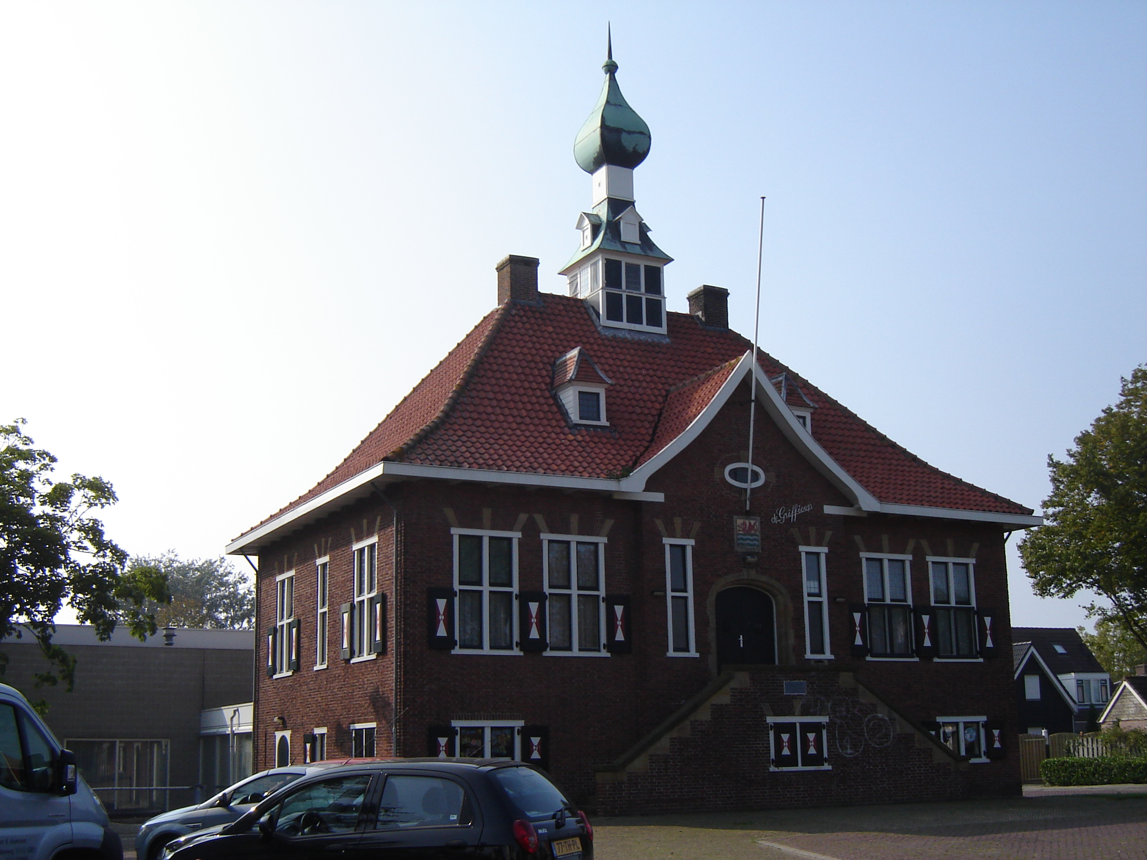 Dorpshuis de Griffioen in Wolphaartsdijk Town hall De Griffioen in Wolphaartsdijk. Wolphaartsdijk, Goes, Zeeland, Netherlands